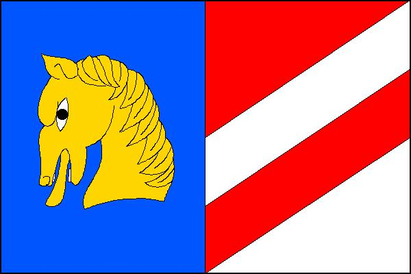 Vlajka obce Kobylá nad Vidnavou